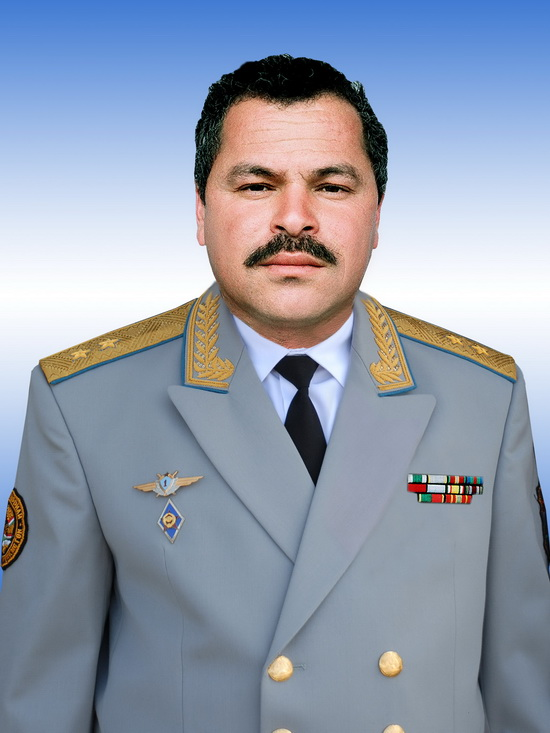 Safaralizoda Rahmonali Davlat